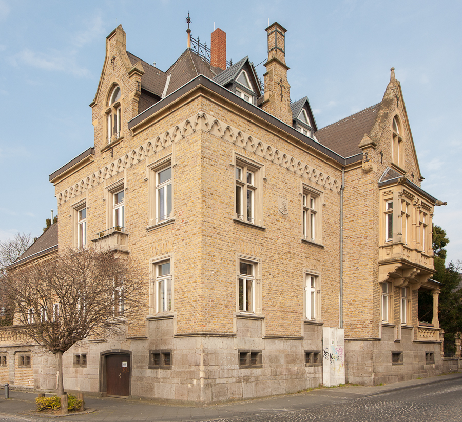 Denkmalgeschützte Villa (erbaut 1883), Von-Weiß-Straße 8 (Ecke Rheinallee), Königswinter